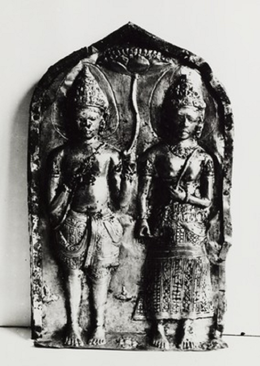 sebuah prasasti dalamLempeng emas dari bukateja, Purbalingga.